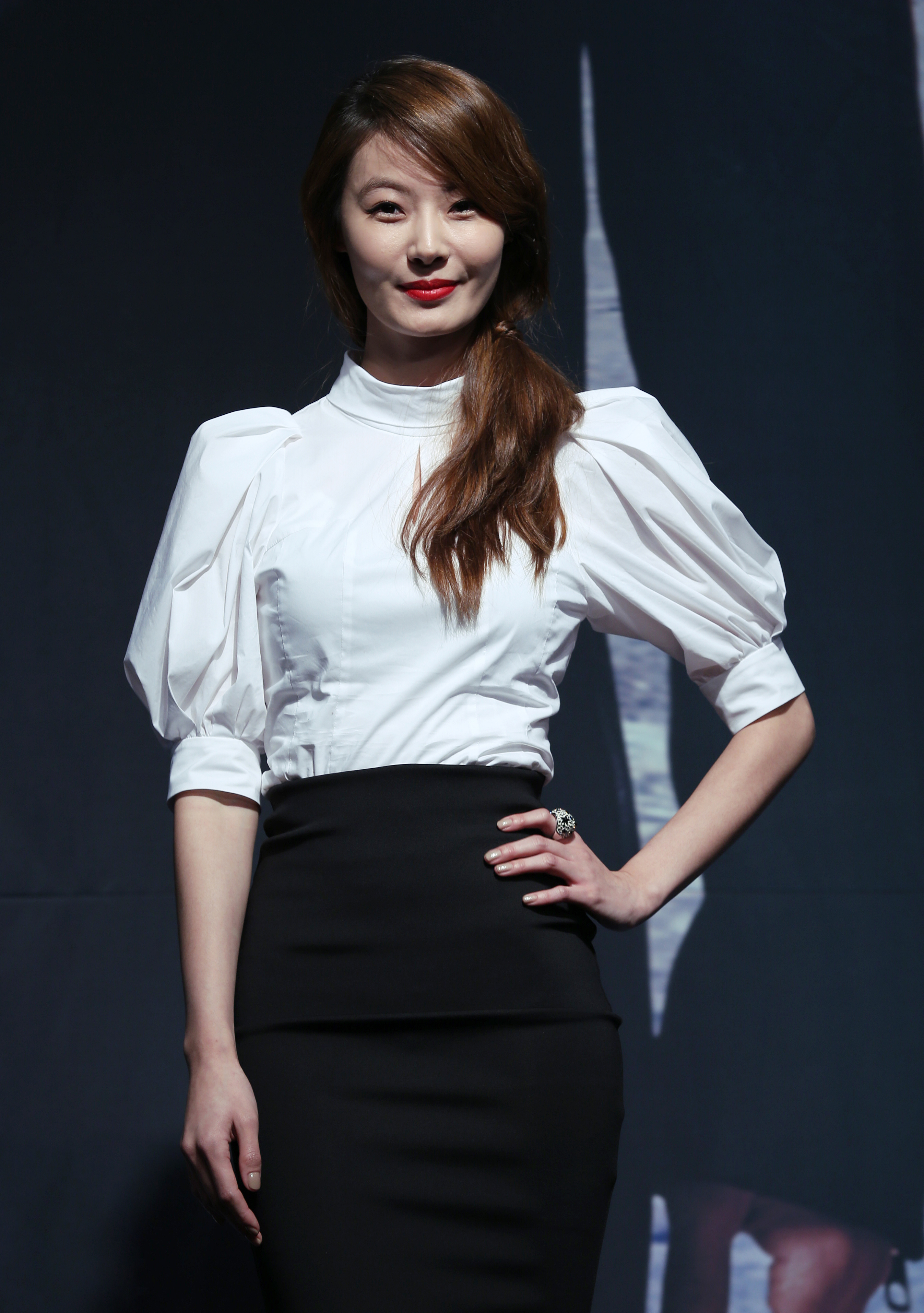 K-Drama 'IRIS 2' Press Conference Yoon so-yi Lotte Hotel, Seoul 2013.02.07. Ministry of Culture, Sports and Tourism Korean Culture and Information Service Jeon Han Articles about IRIS2 Korean blockbuster drama Iris returns (日本語) 韓国ドラマ、2013年のキーワードは“アクション” ブロックバスタードラマ「アイリス(IRIS)２」、いよいよ放映 (中文) 2013年韩剧的关键词为“动作” 风靡一时的韩剧《IRIS》将重返荧幕 (Vietnamese) Phim truyền hình hành động lên ngôi năm 2013 Phần 2 của phim truyền hình bom tấn 드라마 아이리스2 제작발표회 박태희 역으로 아이리스2에 합류한 윤소이 롯데호텔, 서울 문화체육관광부 해외문화홍보원 코리아넷 전한